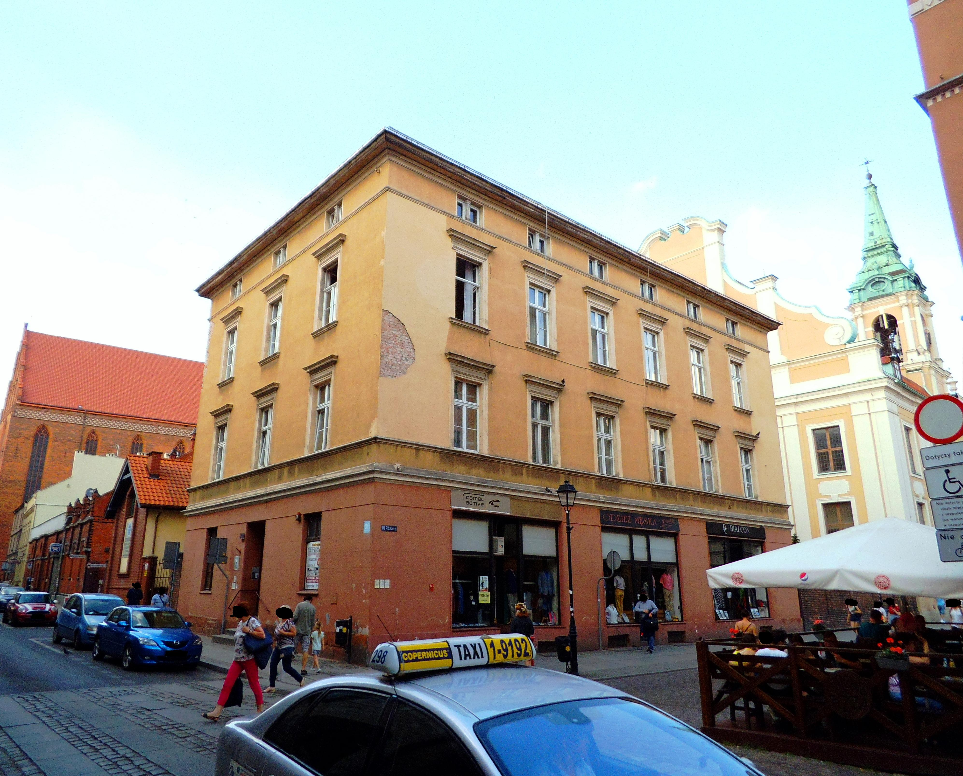 Klasztor oo. jezuitów w Toruniu